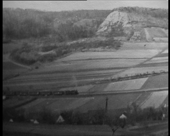 Dampfbespannter Zug auf der Eisenbahnstrecke Porstendorf-Crossen in Richtung Crossen. Um 1962. Die Strecke wurde 1969 stillgelegt.